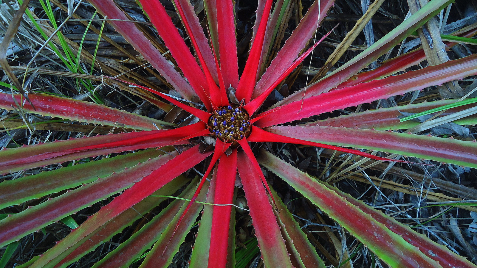 Bromelia unaensis Leme & Scharf